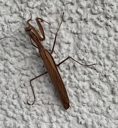 Braune Gottesanbeterin (männlich) an einer Hauswand in Dirmstein / Pfalz.